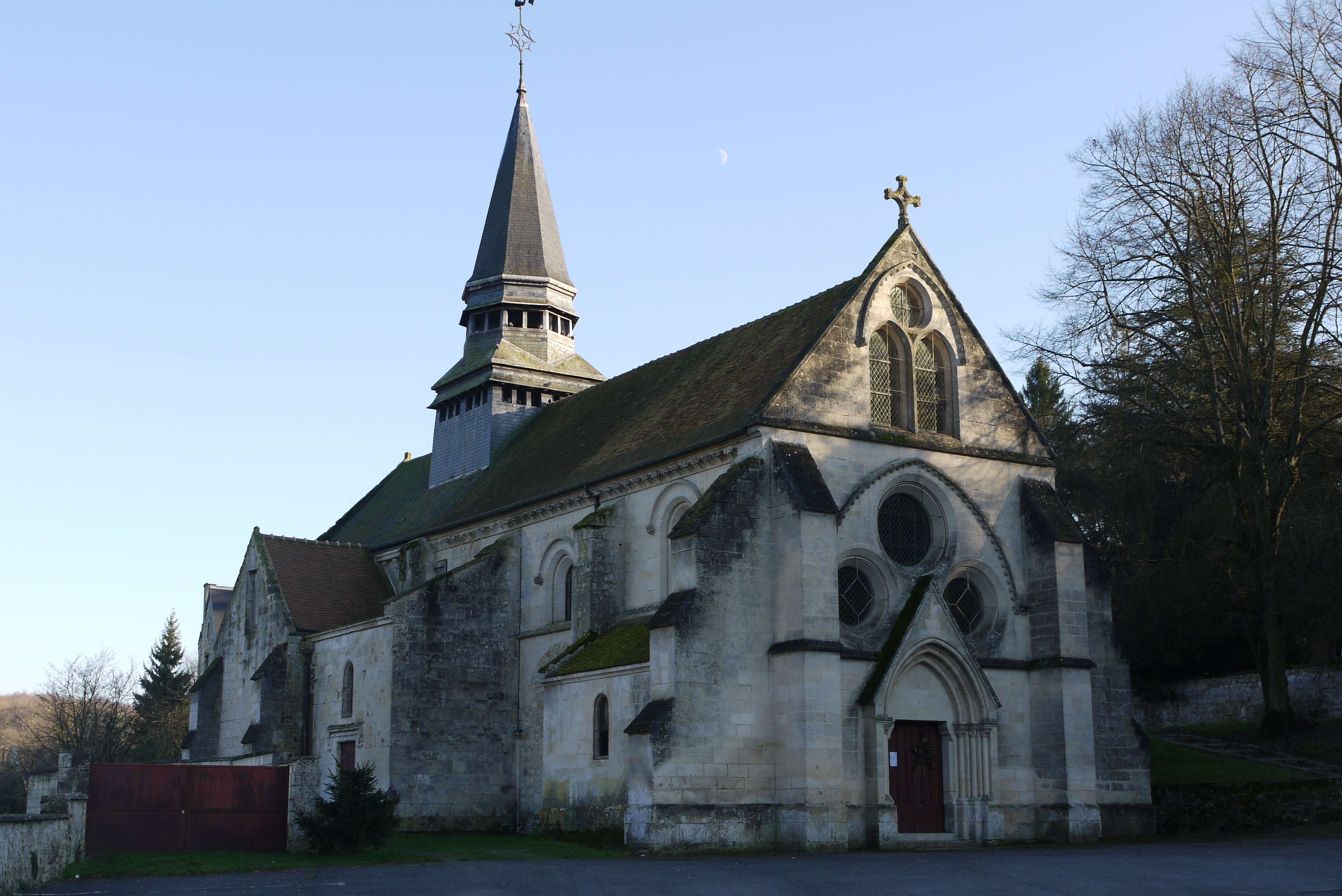 église Saint Alban de Corcy